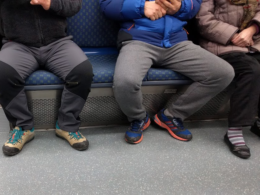 대중 교통에서 쩍벌남의 예시. 좌측과 가운데 두 명은 남성이며, 우측은 여성이다. 부산 도시철도 1호선 촬영.